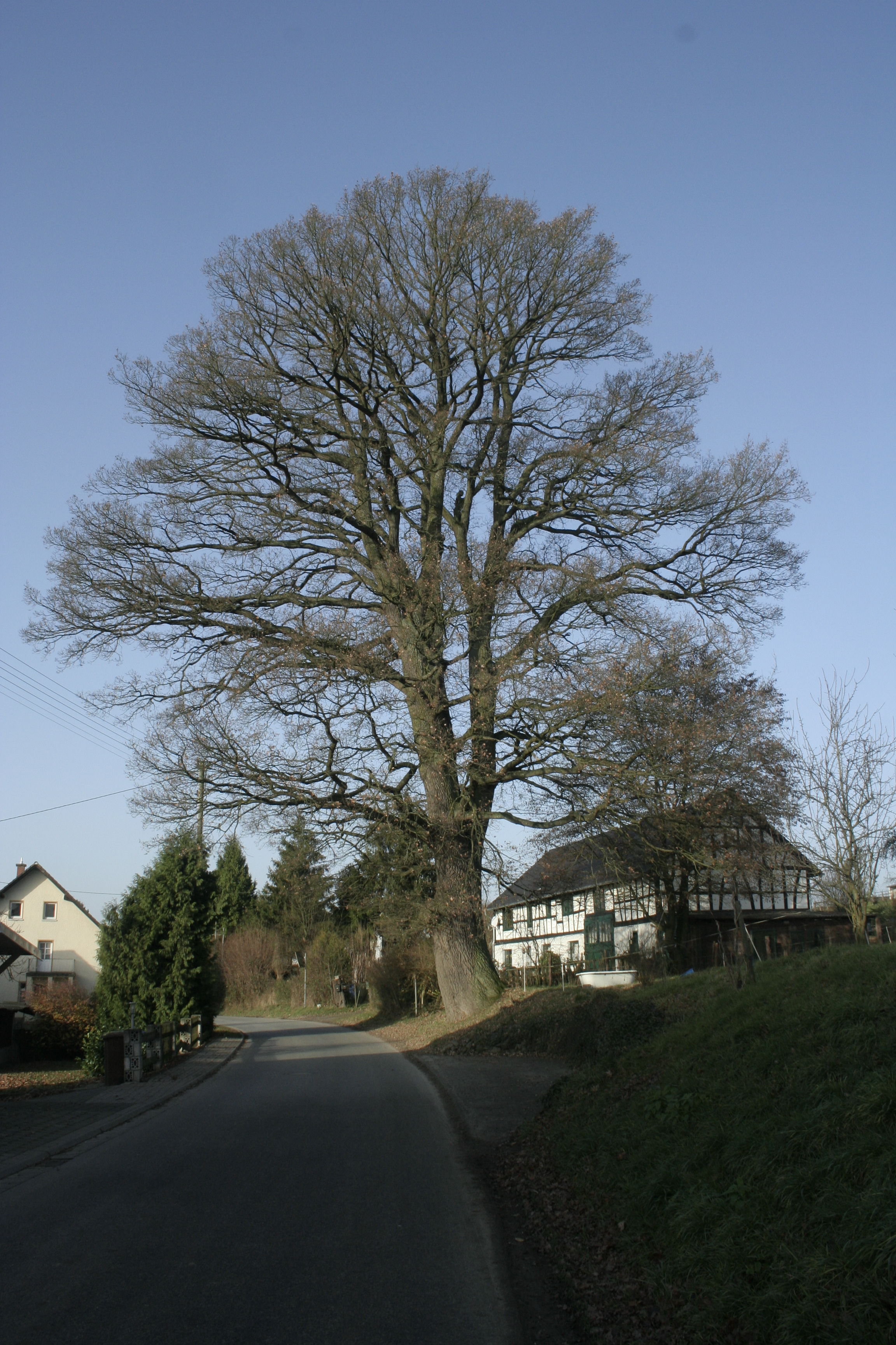 400 Jahre alte Dorfeiche in Kraam